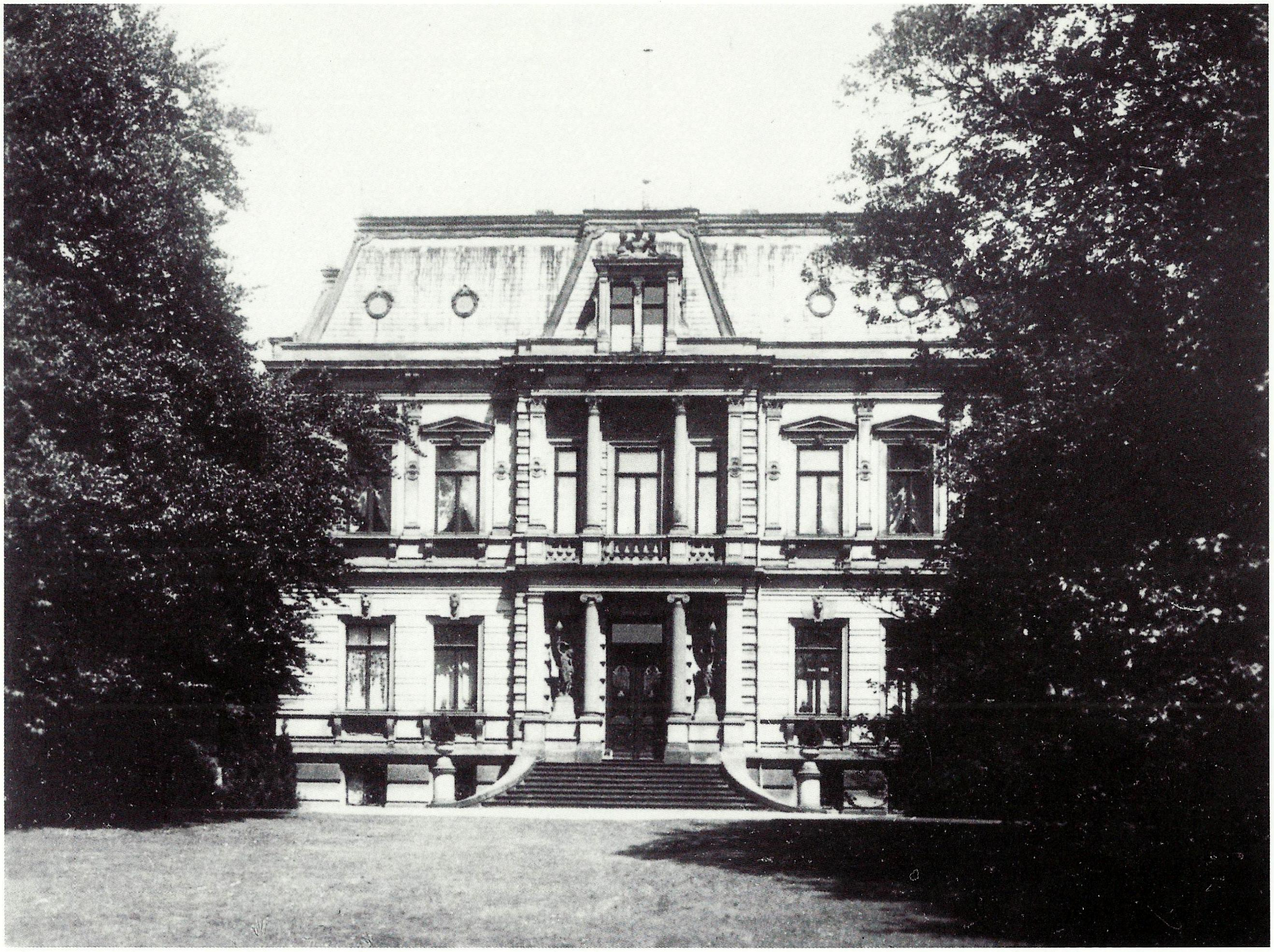 Villa Selve (1955 abgebrochen), Bonn: Straßenfront